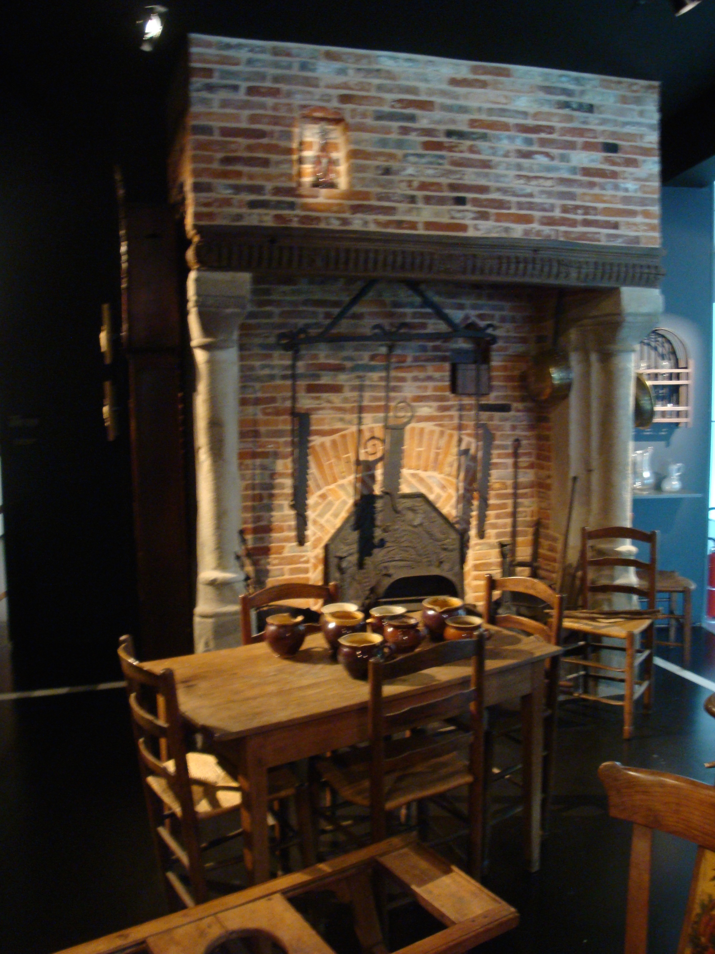 Intérieur d'une maison de marin Fécamp - ethnographie